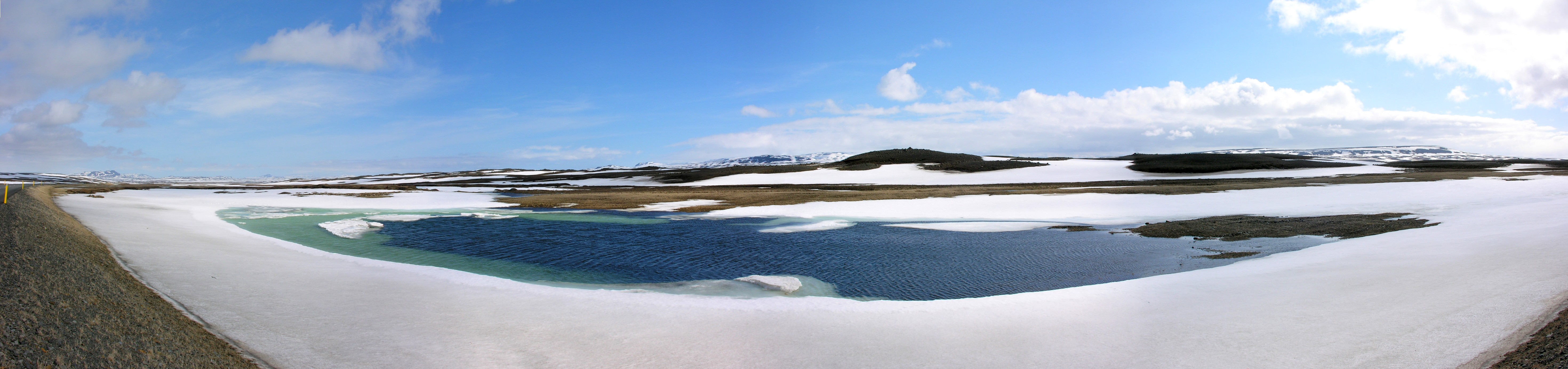 Road No 1 at Jökuldalsheiði